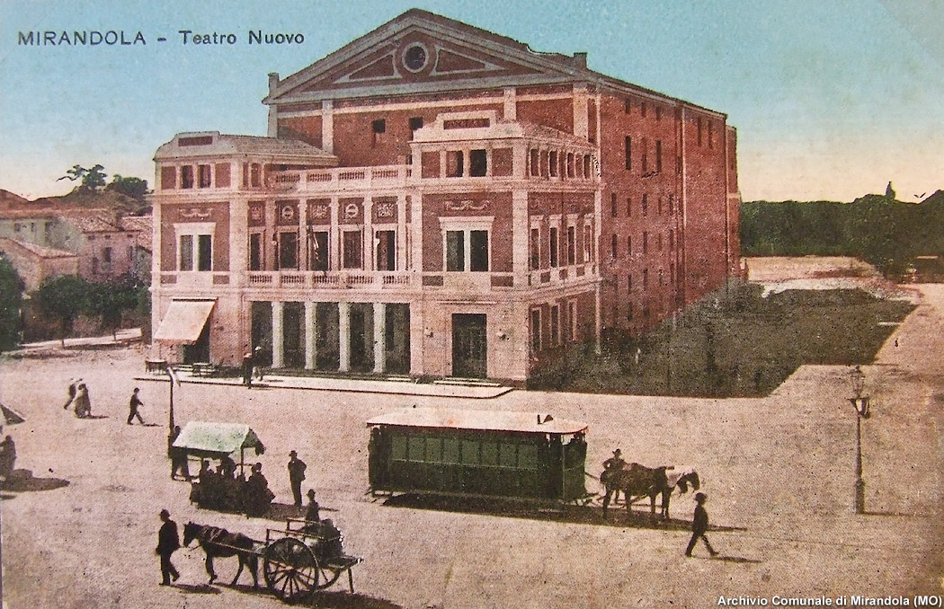 Cartolina del Teatro Nuovo di Mirandola. Si noti in primo piano un tram a cavalli.